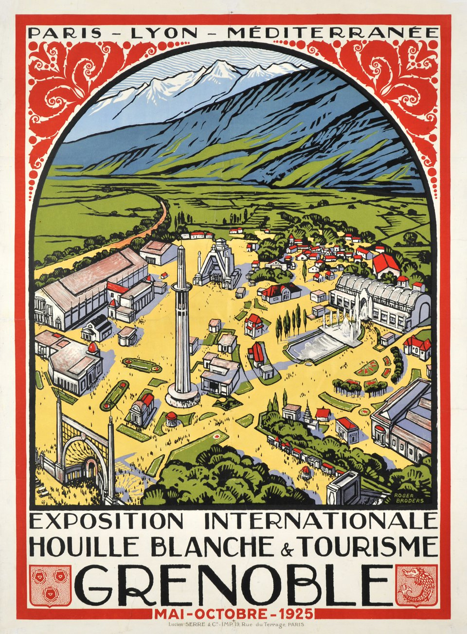 Affiche de la société des chemins de fer PLM pour l'exposition internationale de la houille blanche et du tourisme, Grenoble, 1925.